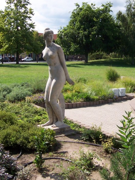 Martsa István magyar szobrászművész Zuhanyozó nő című szobra Siófokon.